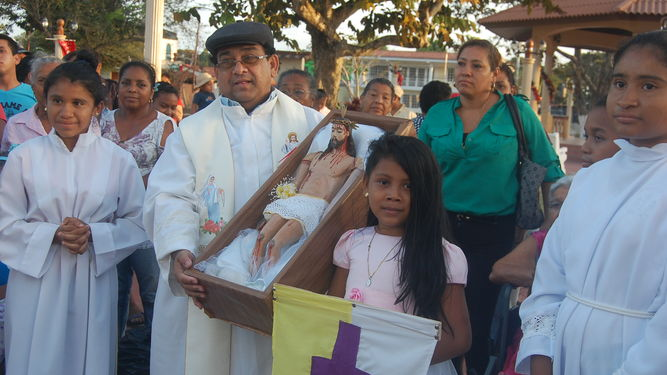 Hallazgo del Cristo de Esquipulas